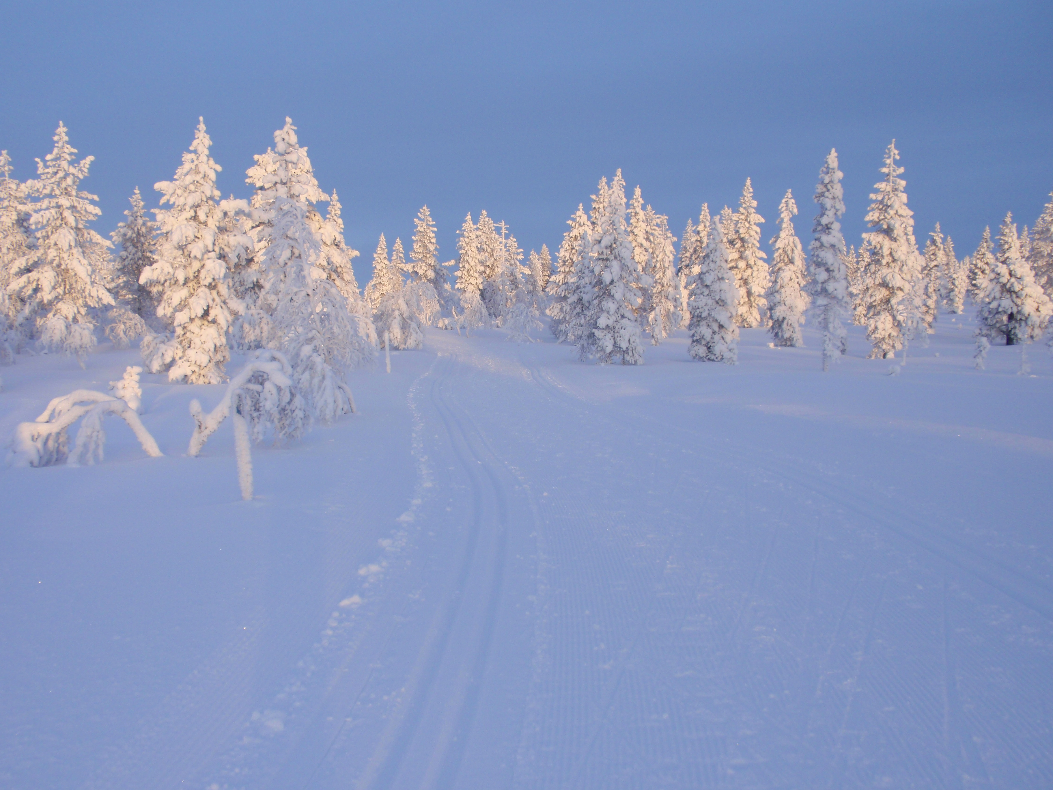 Paisaje helado al atardecer en el Parque de Kiilopää